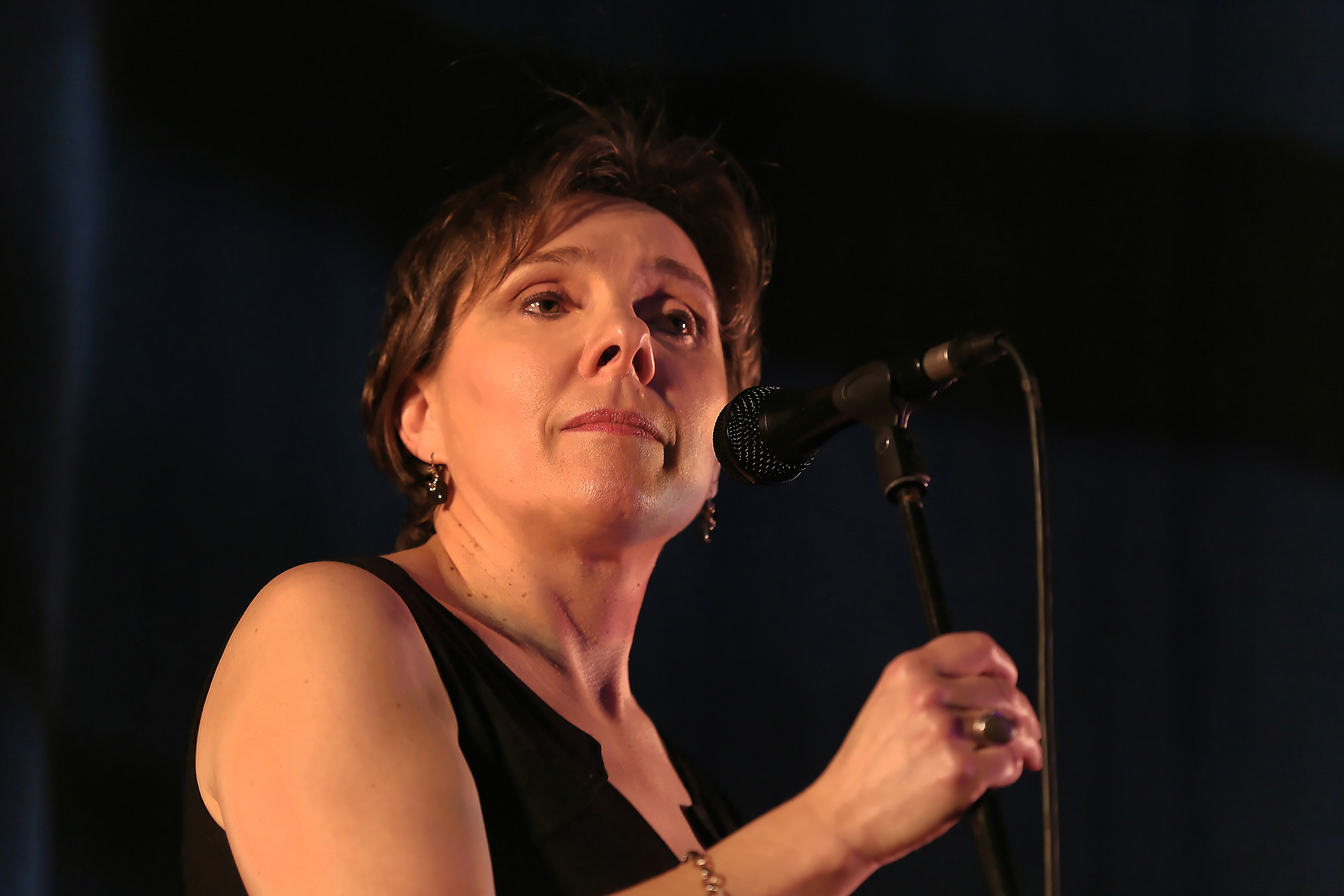 Annie Ebrel et Nolùen Le Buhé en fest-noz lors du festival Yaouank le 21 novembre 2015 au Parc des Expositions de Rennes.